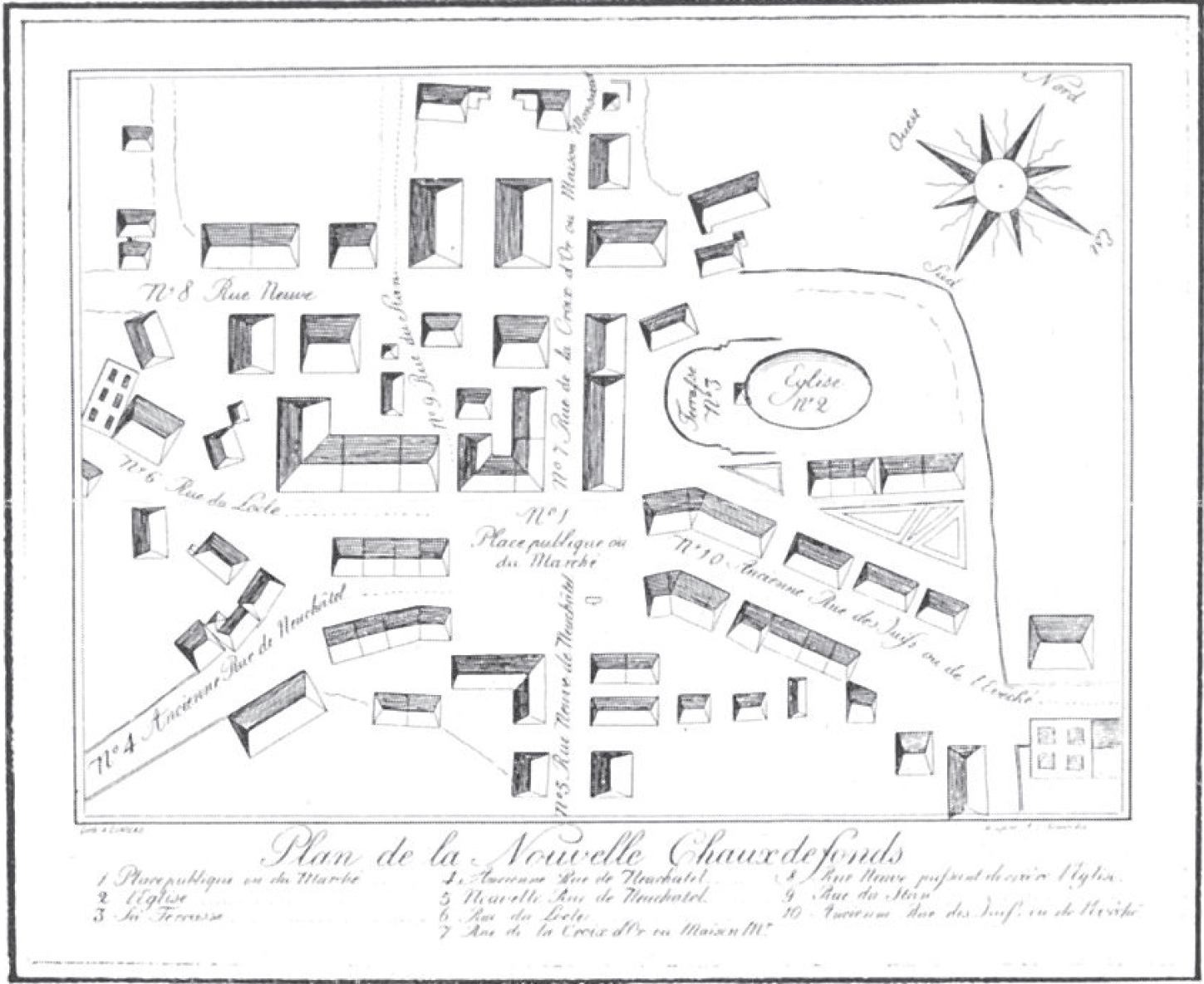 Plan de la Nouvelle Chaux de Fonds, Abraham Louis Girardet, Lithografie, um 1800. Die Planung wird dem Baumeister und Graveur Moïse Perret-Gentil zugeschrieben